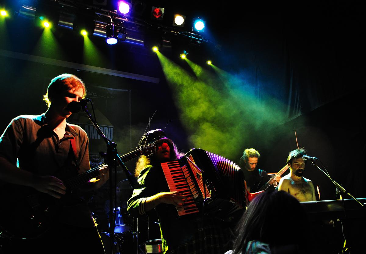 První hoře v divadle Pod lampou 2009